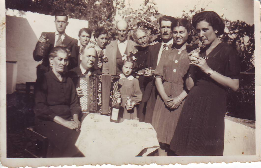 José Ferreiro (Pai),esposa,sogros,filha e sobrinhos